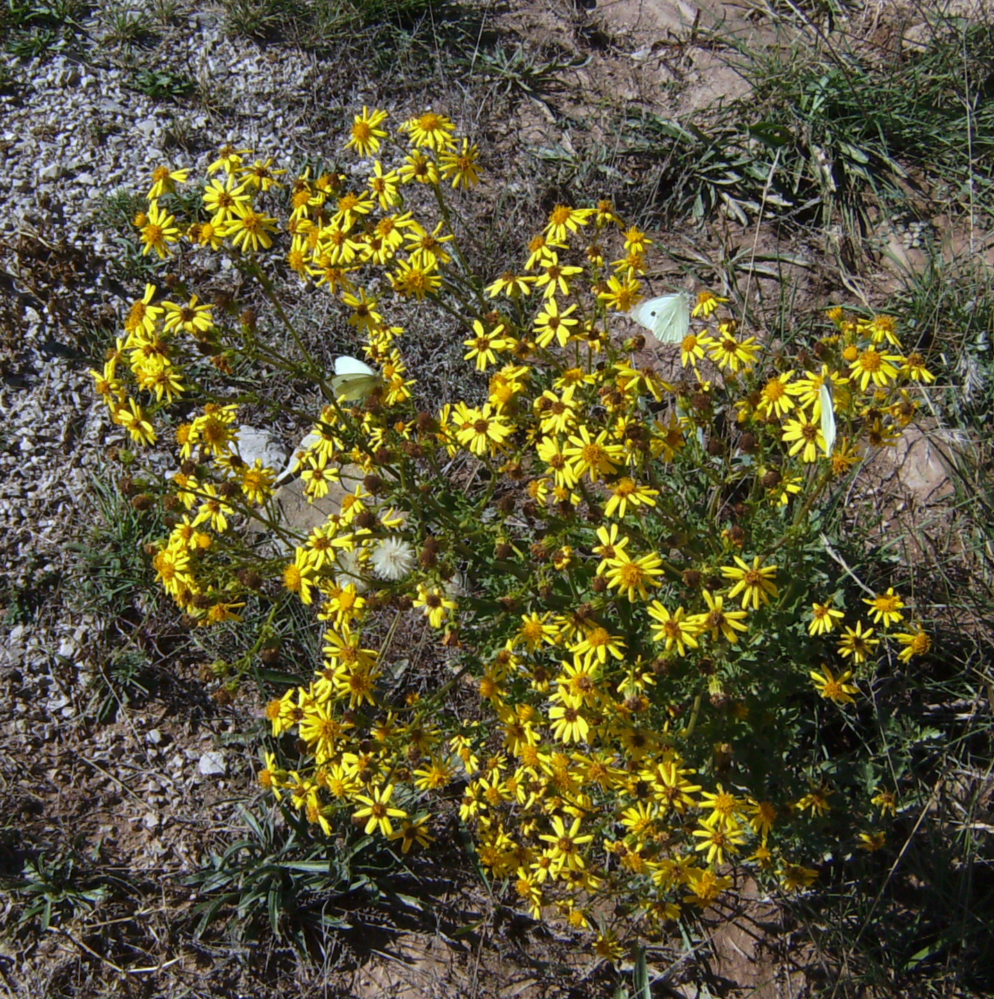 Dittrichia viscosa, sinònim Inula viscosa a Castelltallat amb papallones Pieris